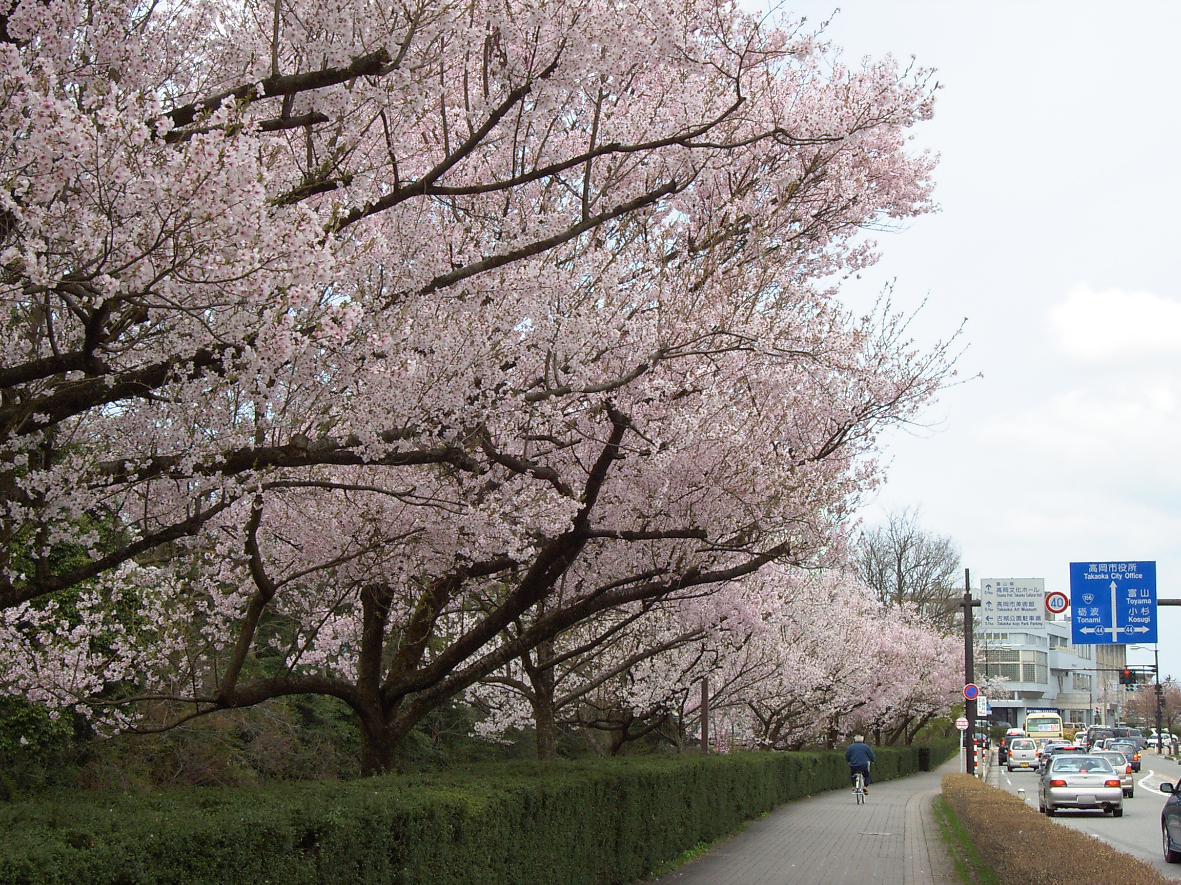 桜。高岡古城公園 (日本、富山県高岡市)にて。 / A cherry (Prunus sp.) in Takaoka Kojō Park (Takaoka-city, Toyama, Japan)